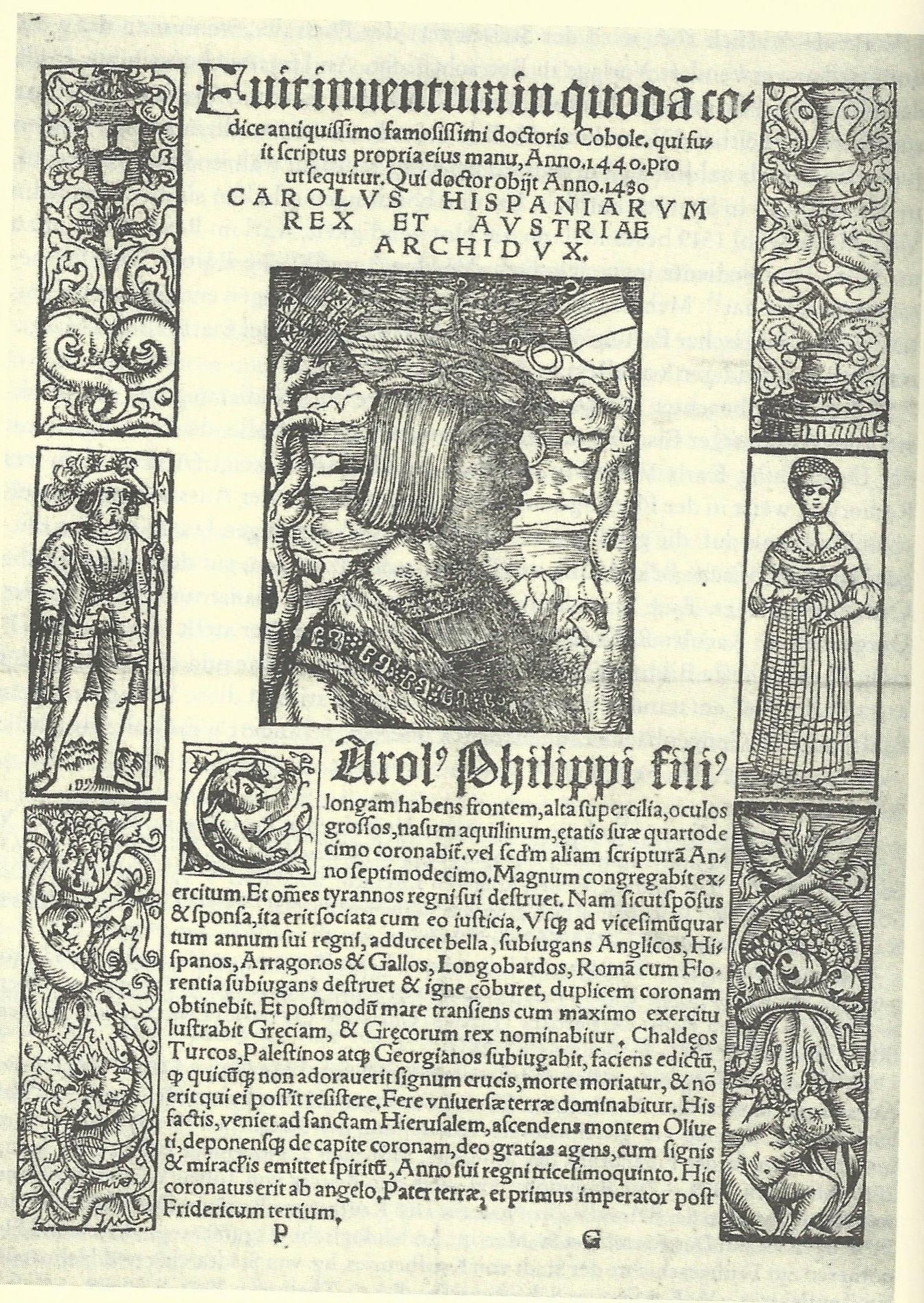 Prophetie auf Karl V. Einblattdruck Basel Pamphilus Gengenbach, Hauptstaatsarchiv Stuttgart